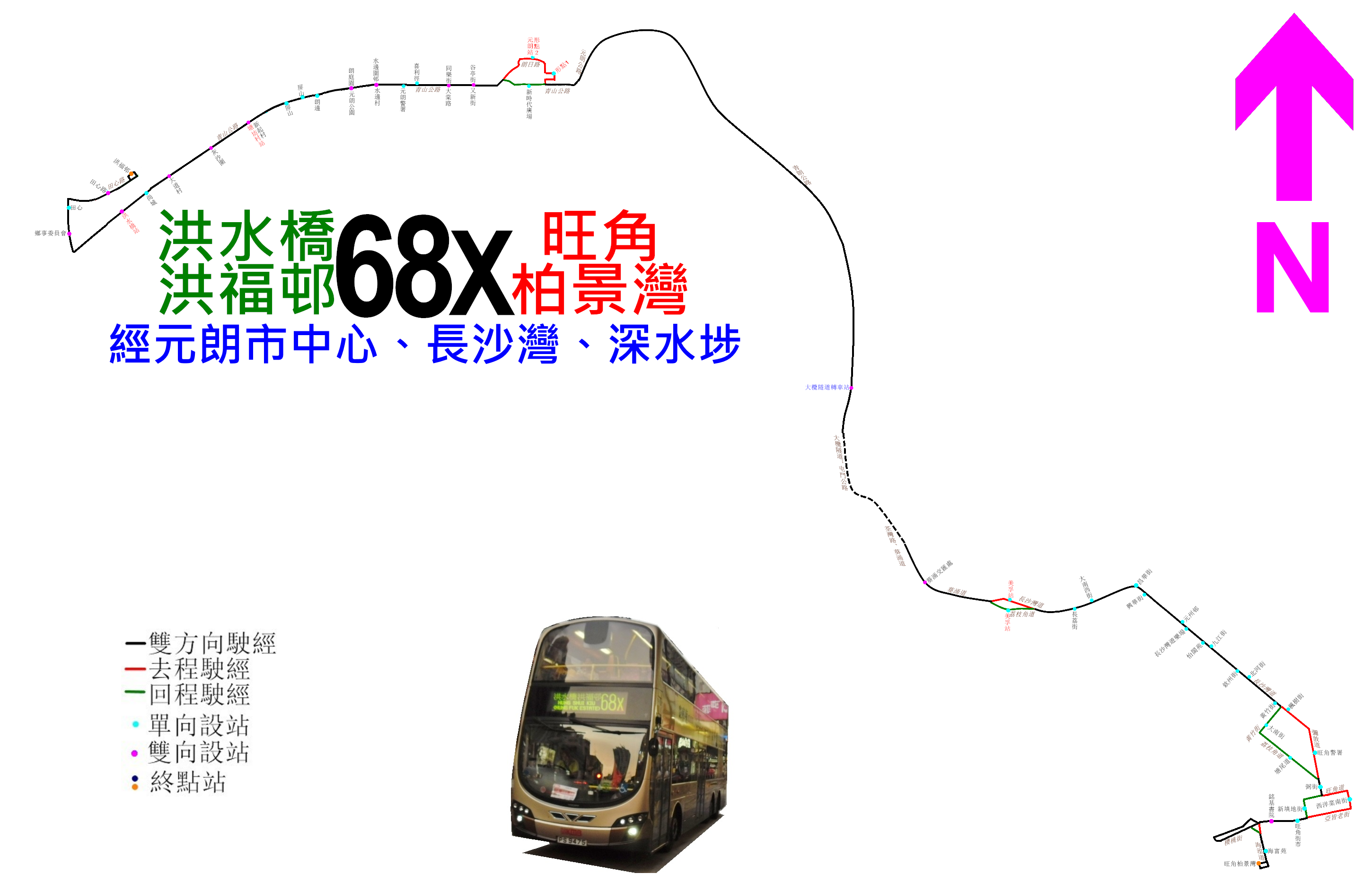 中文（香港）: 九巴68X線的走線圖